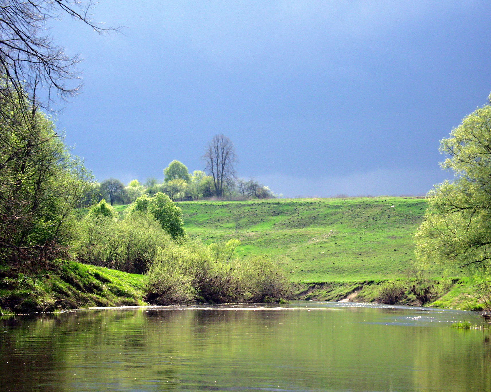 Перед грозой. р. Воря